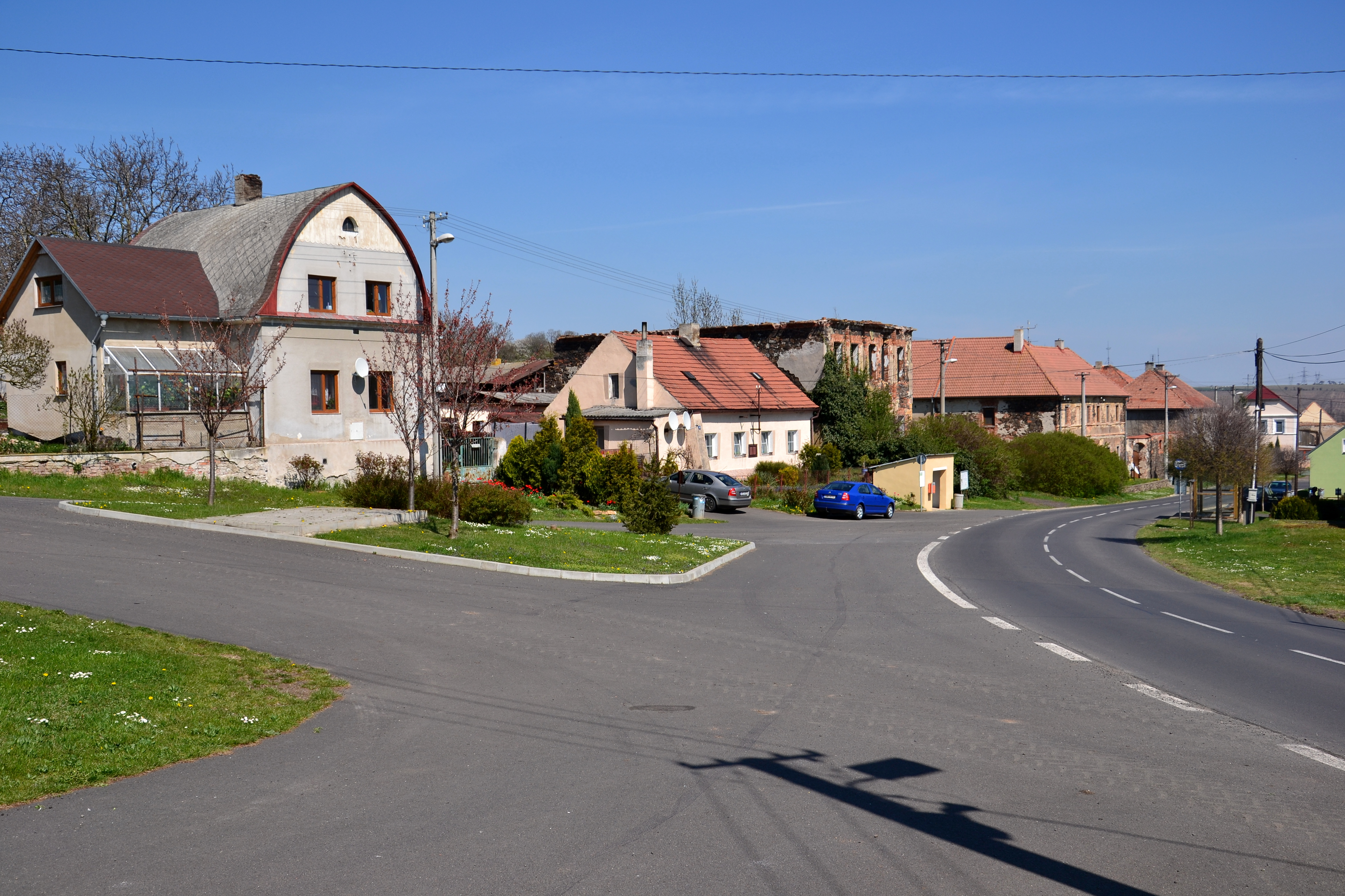 Náves od západu